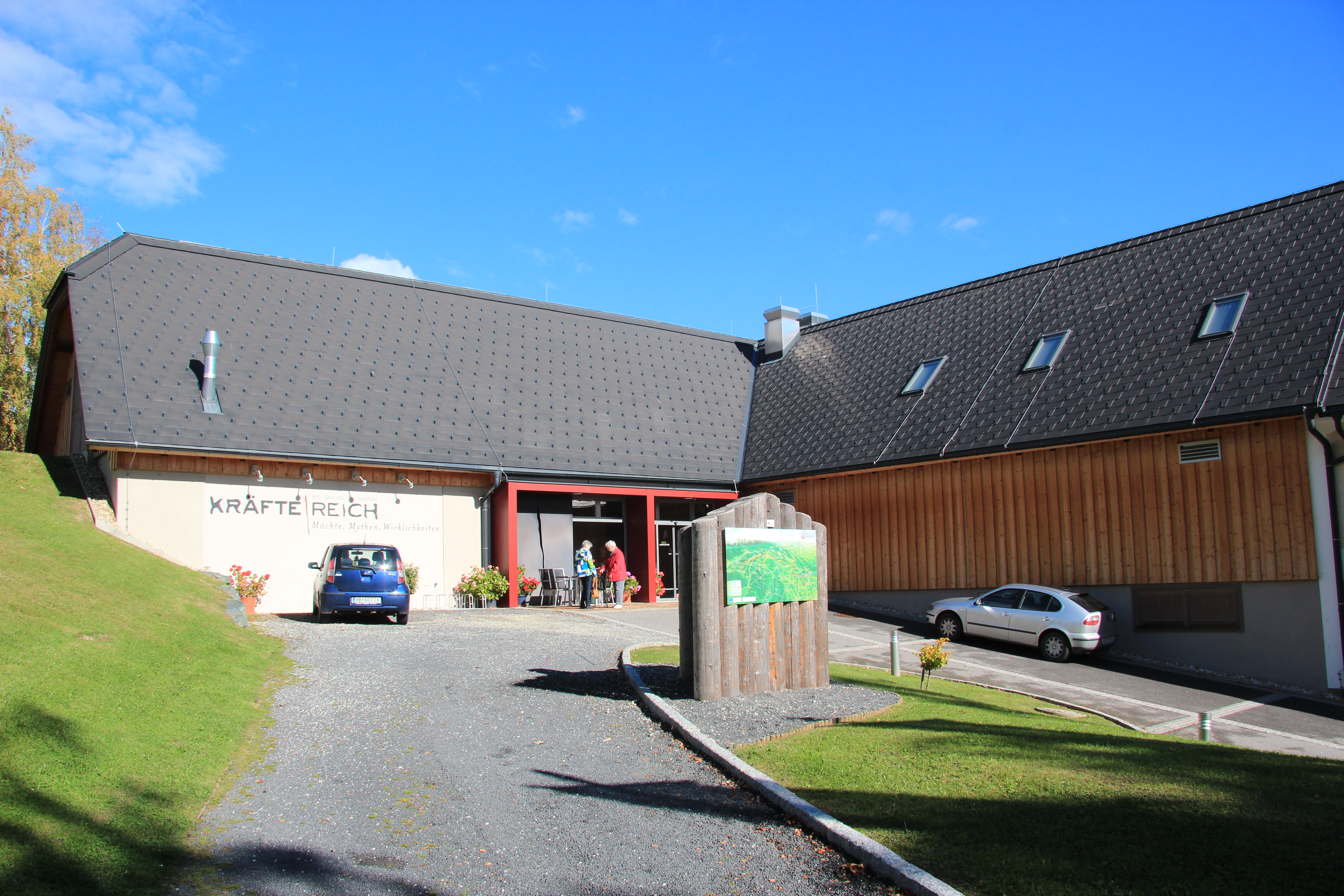 Sankt Jakob im Walde im steirischen Joglland